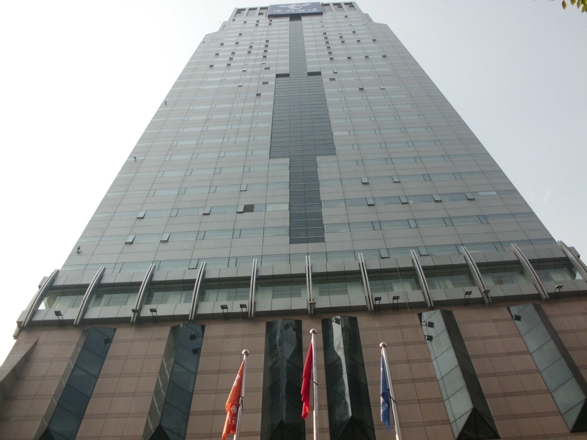 杭州电信大厦